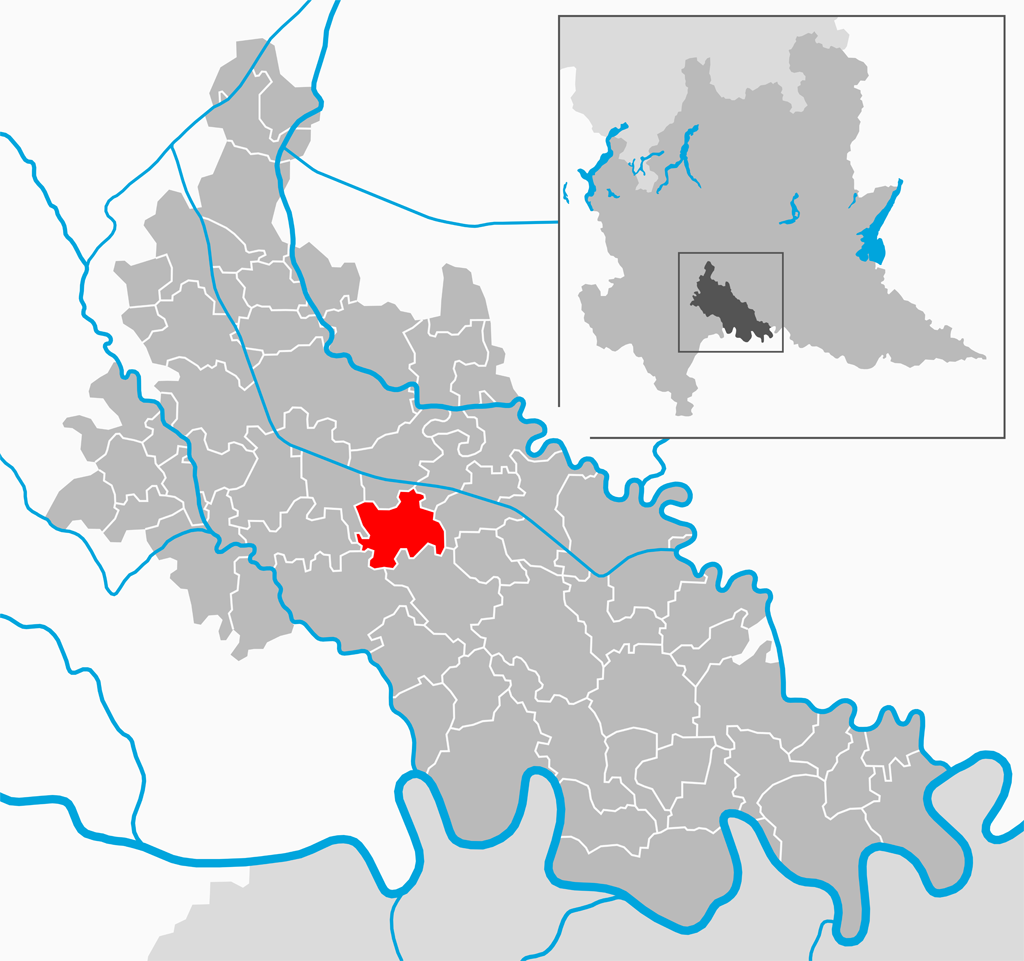 Il comune di Ossago Lodigiano nella provincia di Lodi.